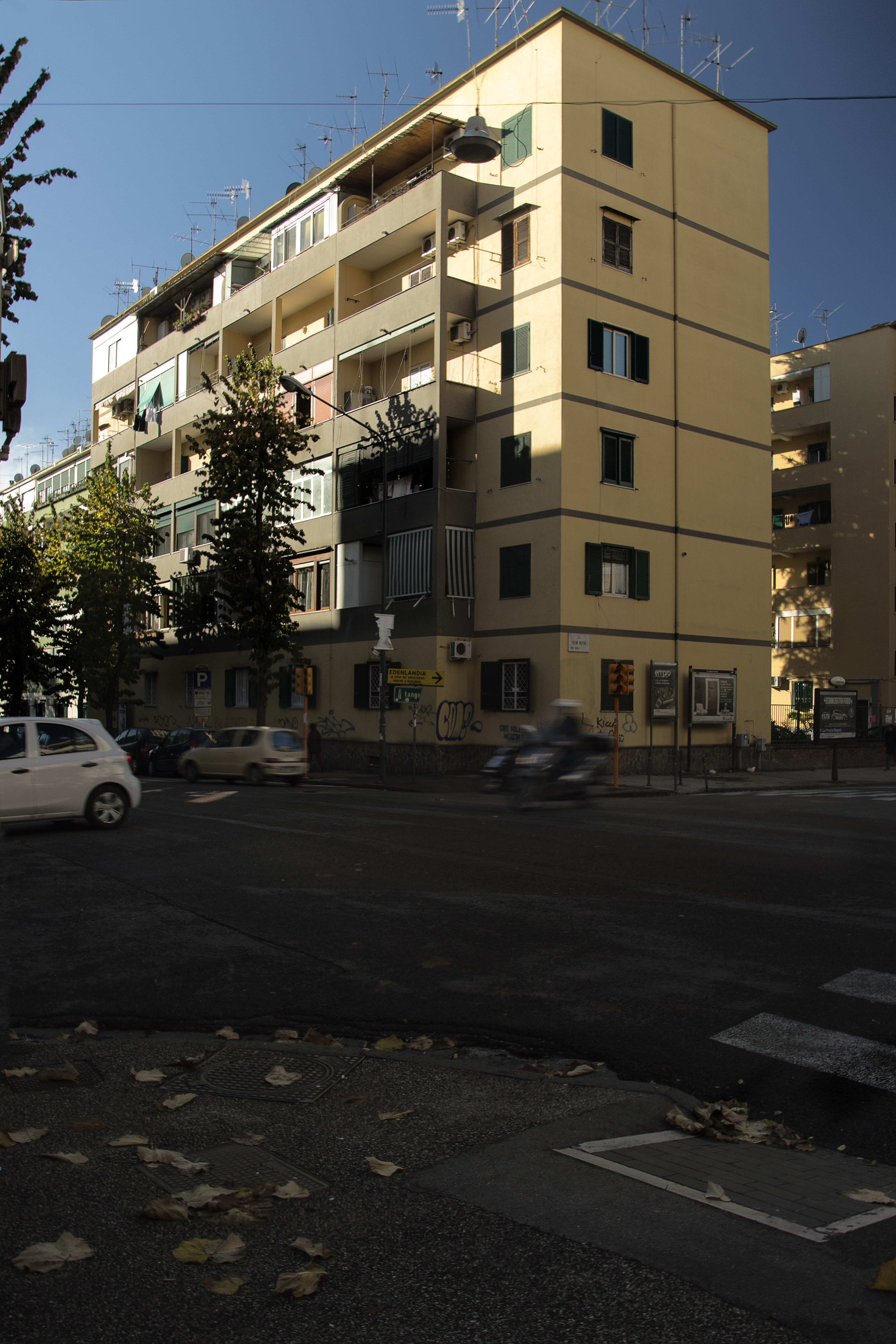 Uno degli edifici che compongono il rione caratterizzato dal prospetto con le logge.